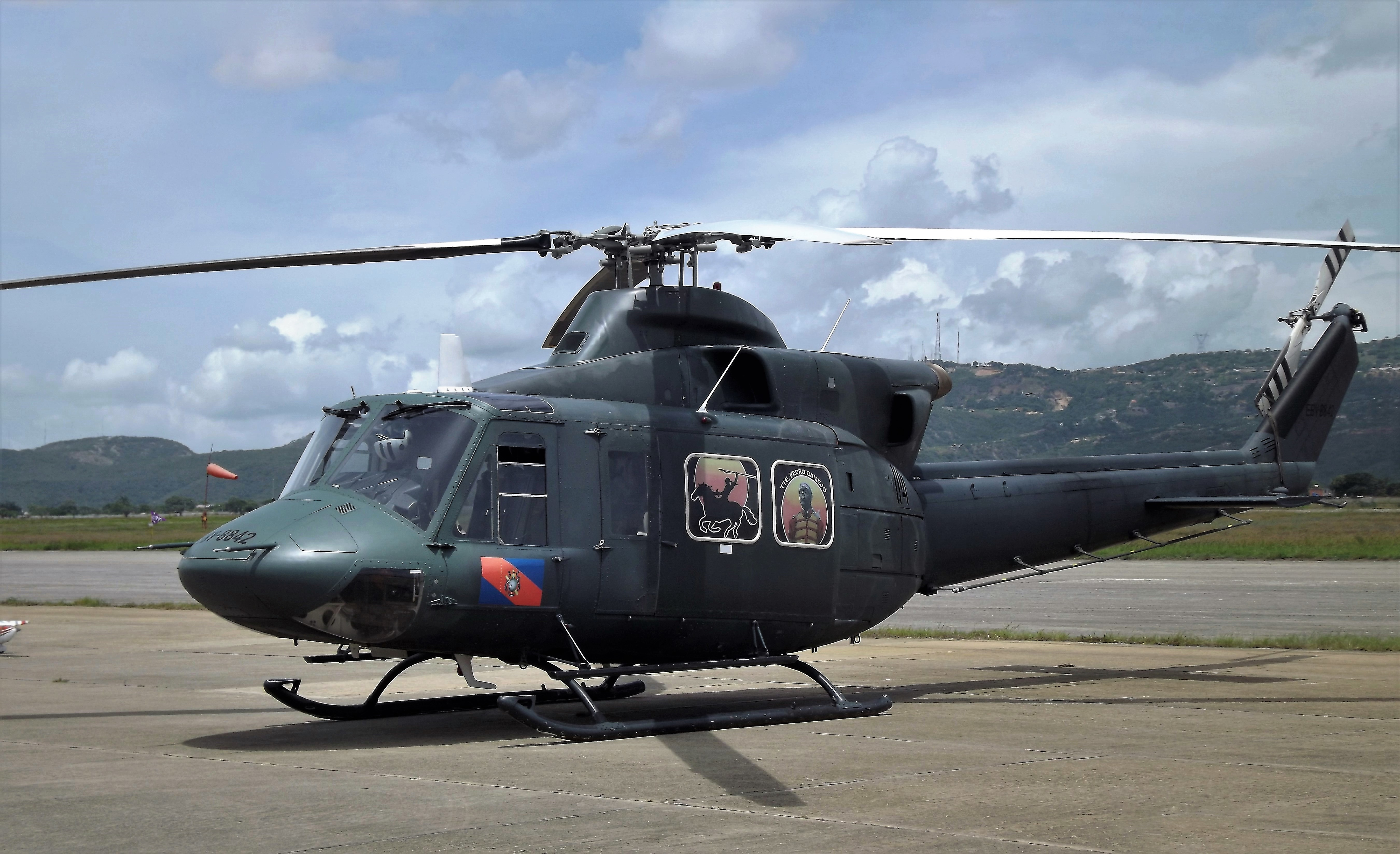 Bell 412 SP del comando aéreo del Ejército Venezolano (EBV-8842) en la Base Aérea Teniente Vicente Landaeta Gil. Barquisimeto, Lara. (BALANDA)